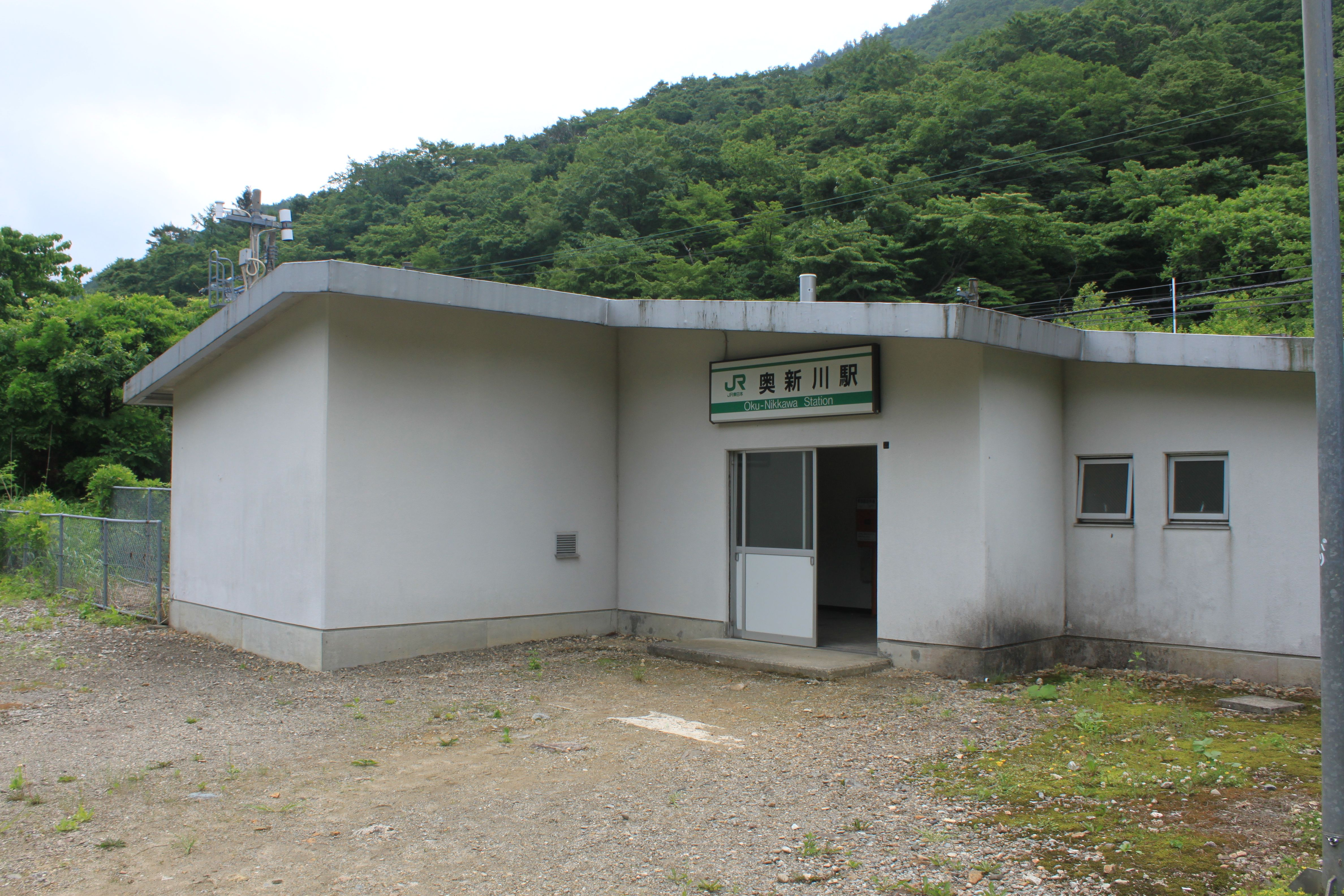 奥新川駅